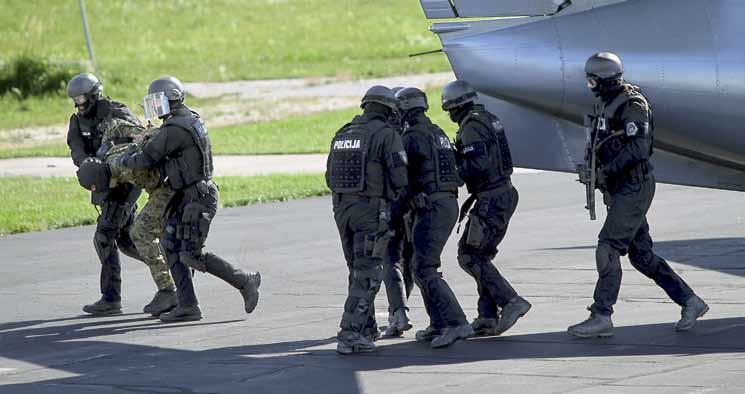 Pripadniki specialne enote Policije na vaji .